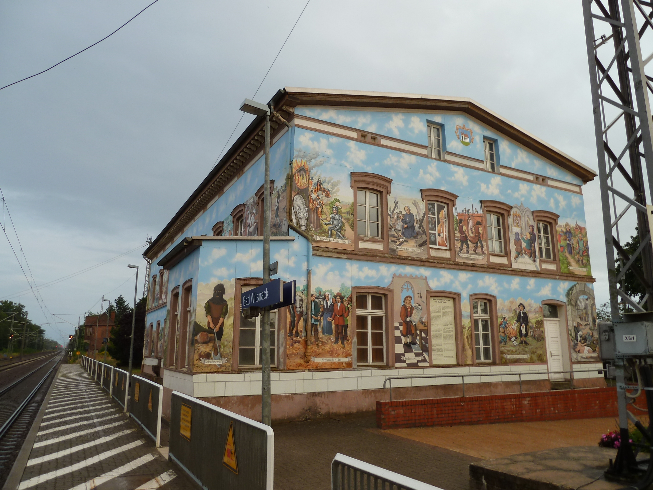 Bahnhof Bad Wilsnack, denkmalgeschütztes Bahnhofsgebäude mit Bildern aus der Stadtgeschichte von Wolfgang C. Mock